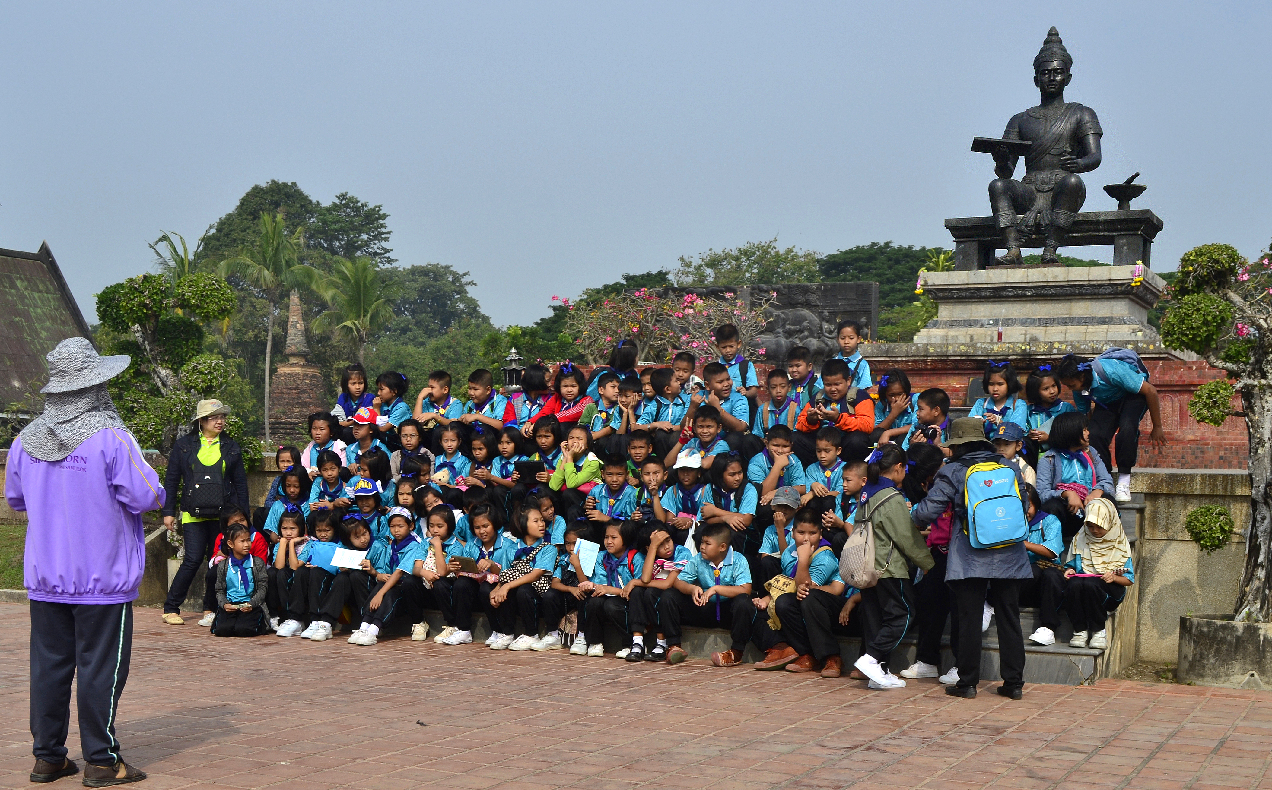 Schulklasse vor dem King Ramkhamhaeng Monument